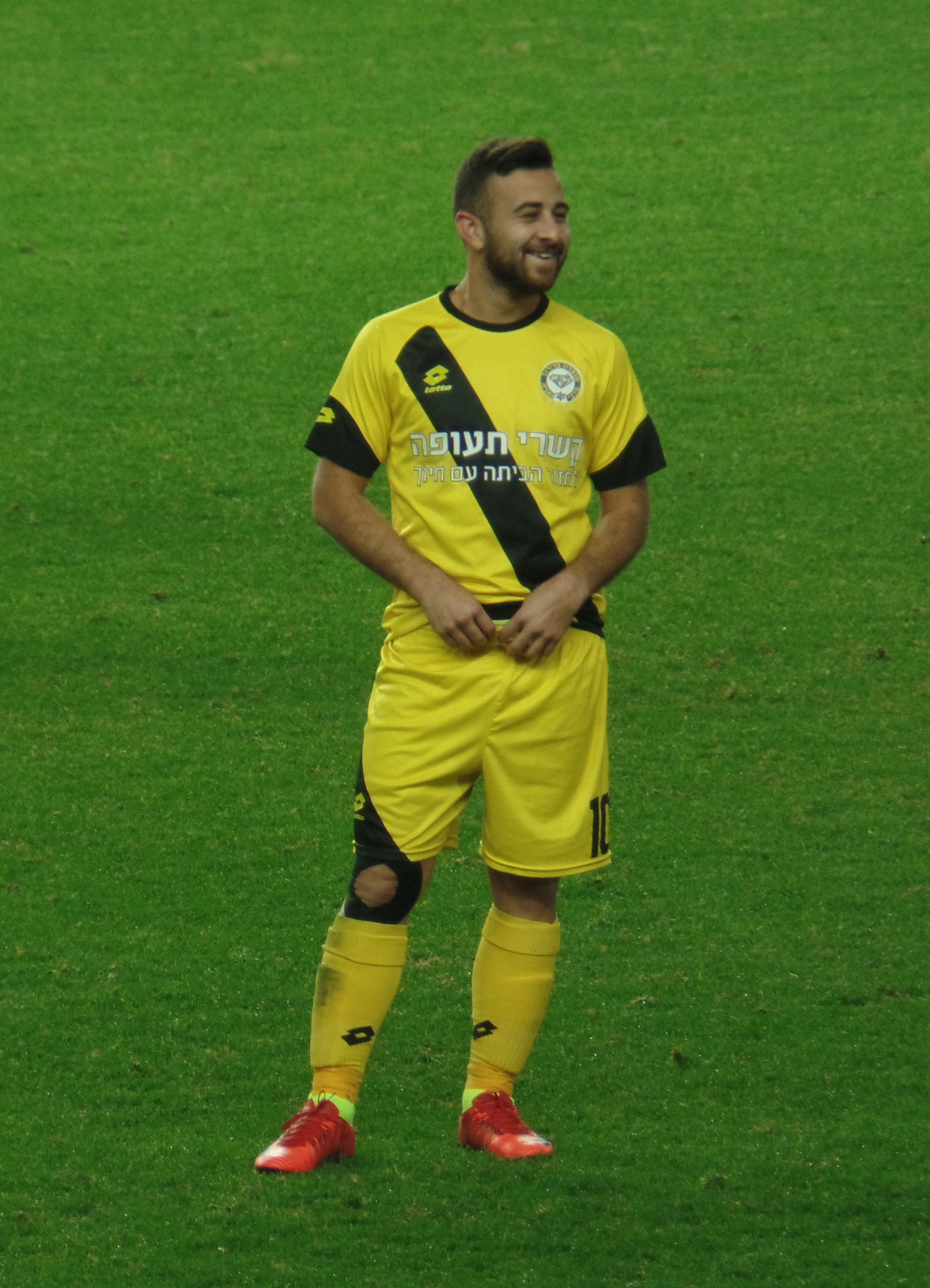 דיא סבא במדי מכבי נתניה (ינואר 2018)